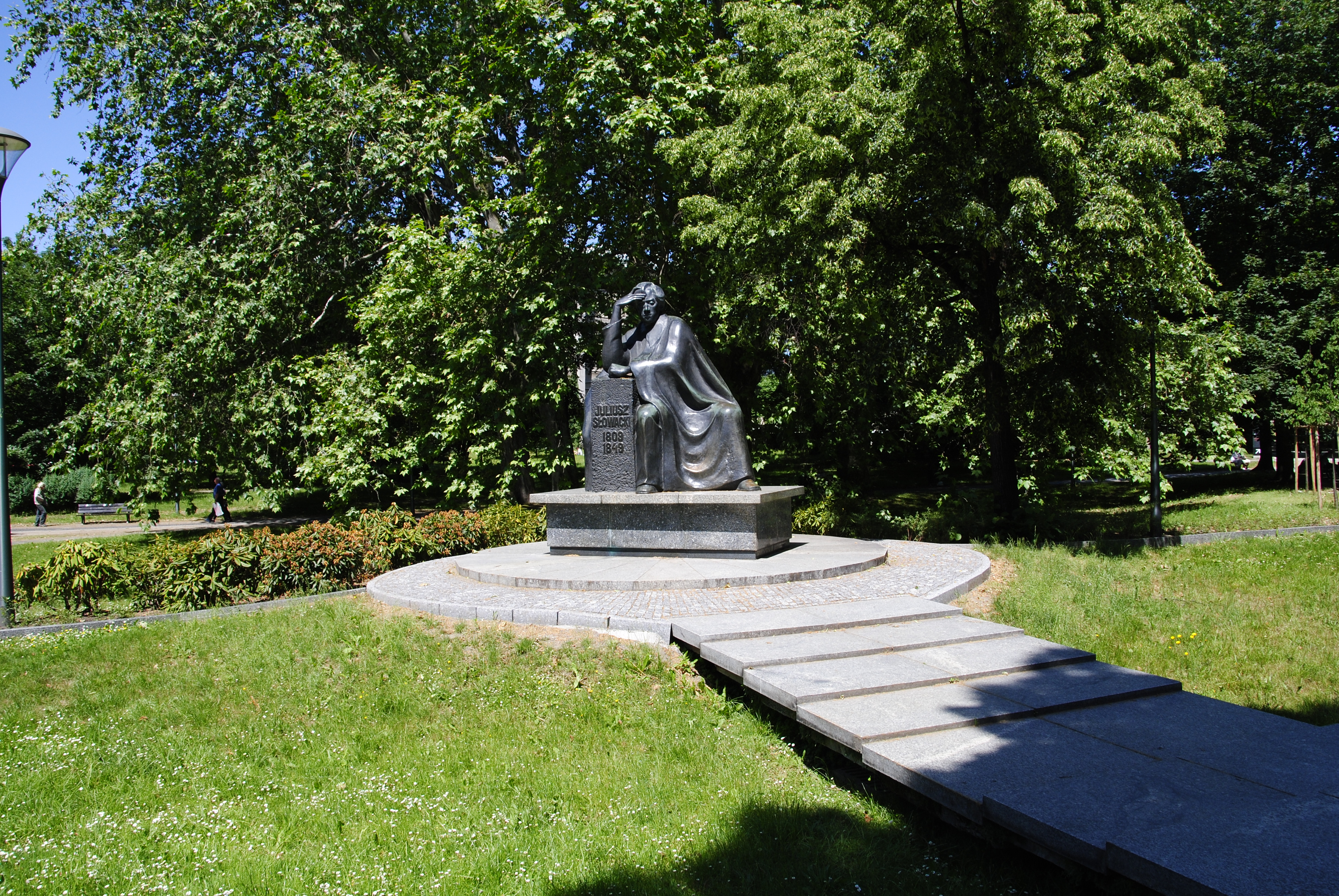 Denkmal Juliusz Slowacki Monument in Breslau